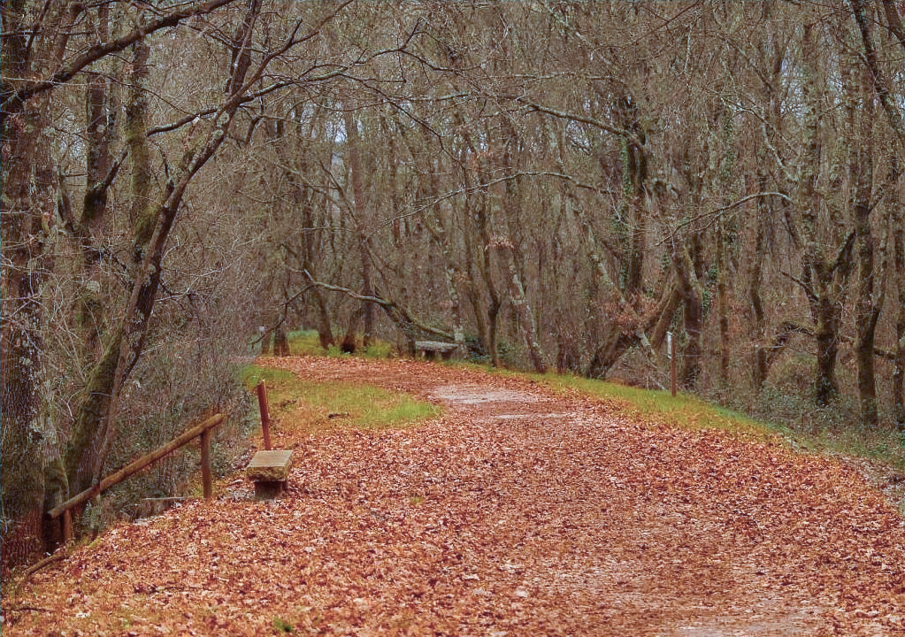 Gándaras de Budiño. Este es el camino que lleva a los observatorios de pajaros de Las Gandaras de Budiño, en Porriño, cerca de Vigo. Parece que los arboles te van a abrazar!